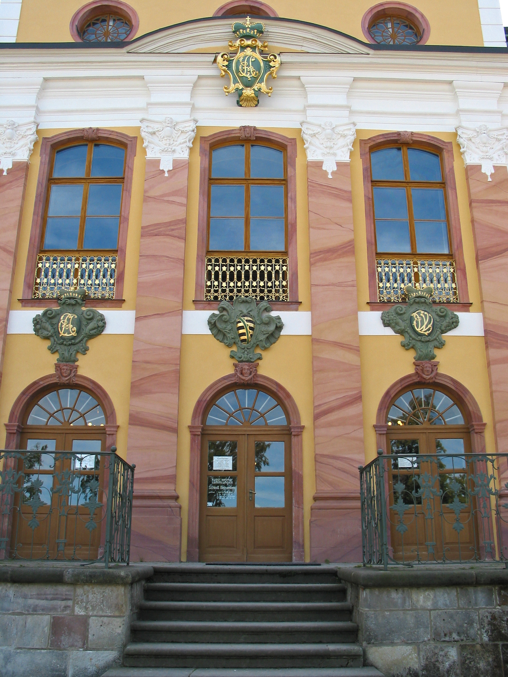 Nordansicht des Schlosses Belvedere bei Weimar mit dem Haupteingang zum Rokoko-Museum.